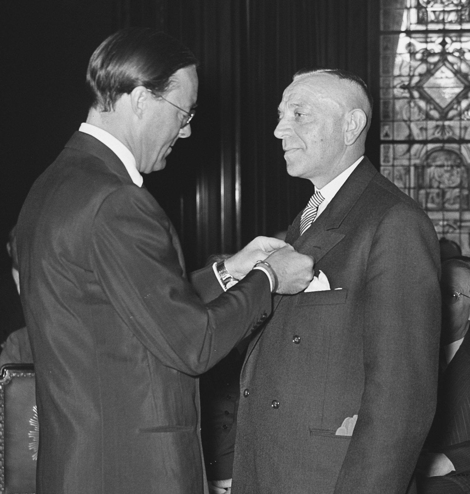 Collectie / Archief : Fotocollectie Anefo Reportage / Serie : [ onbekend ] Beschrijving : Uitreiking zilveren Anjers door Prins Bernhard in de W. E. A. Scheelen Datum : 17 juni 1955 Trefwoorden : Uitreikingen Persoonsnaam : Bernhard, prins, W. E. A. Scheelen Instellingsnaam : Zilveren Anjer Fotograaf : Bilsen, Joop van / Anefo Auteursrechthebbende : Nationaal Archief Materiaalsoort : Glasnegatief Nummer archiefinventaris : bekijk toegang 2.24.01.09 Bestanddeelnummer : 907-1867 Reacties Geplaatst door Maaike op 06 november 2012 - 16:48. Instellingsnamen: Prins Bernhard-fonds (thans Prins Bernhard Cultuurfonds) locatie: Nederlandsche Handel Maatschappij plaats: Amsterdam